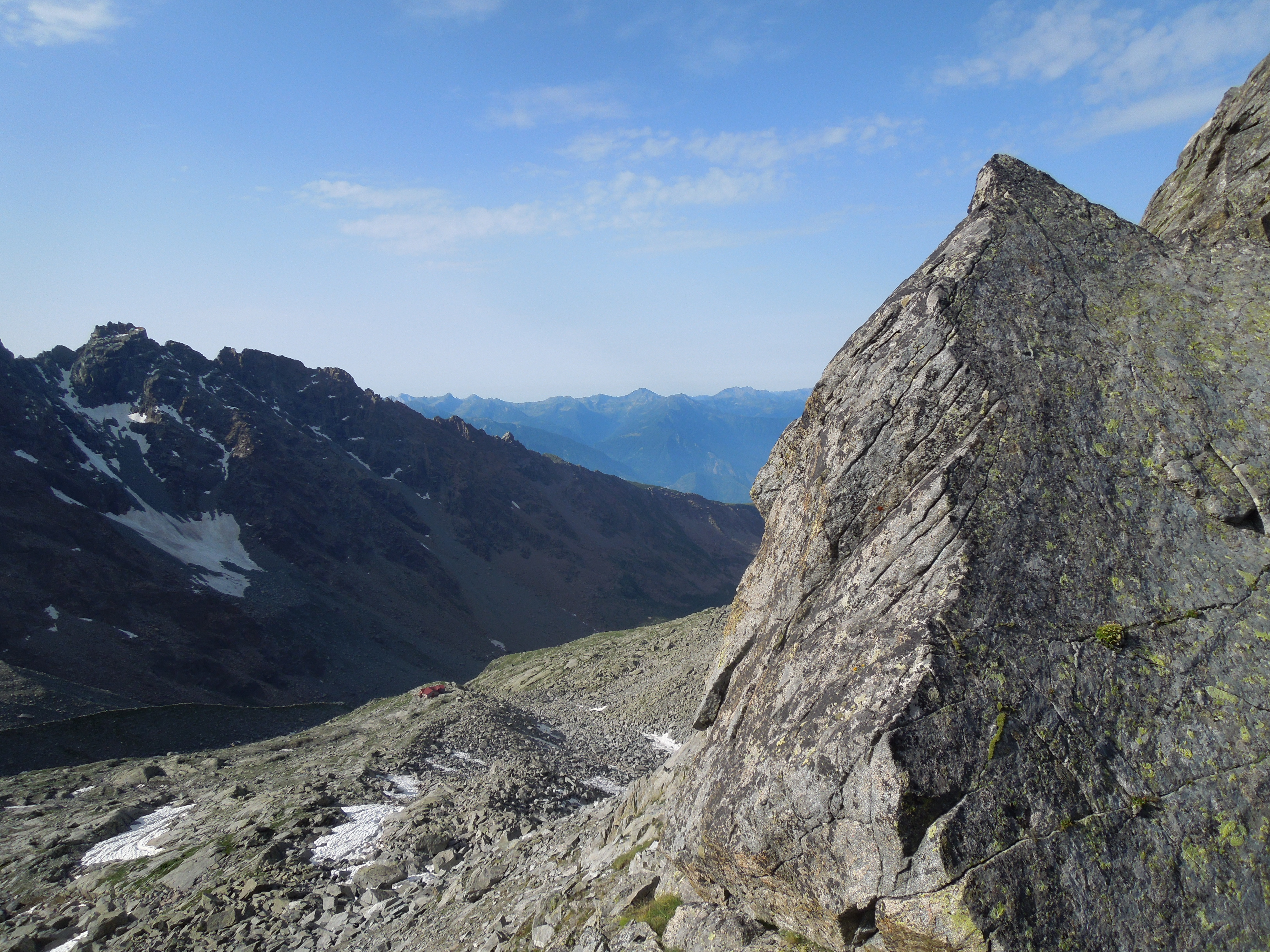 Lumbaart: La Val de Preda Rossa (Val Masen, SO).